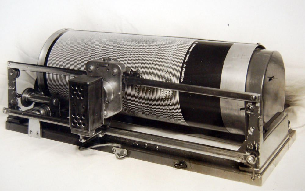 Fotoliptófono